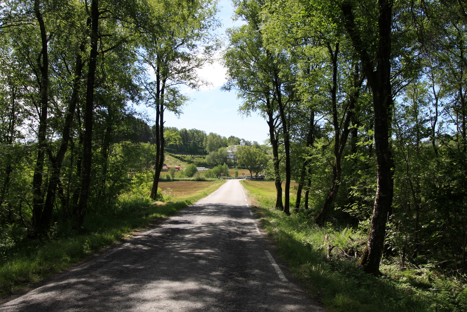 Fylkesvei 335 Lyngnesveien, i bakgrunnen Sviland kirke